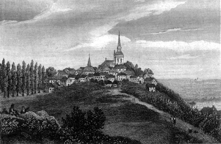 Image en provenance du livre : Eusèbe Girault de Saint-Fargeau, Guide pittoresque du voyageur en France, contenant la statistique et la description complète des quatre-vingt-six départements, orné de 740 vignettes et portraits gravés sur acier, de quatre-vingt-six cartes de départements et d'une grande carte routière de la France, par une Société de gens de lettres, de géographes et d'artistes, Paris, F. Didot frères, 1838, 6 volumes in-8° (BNF : 8-L25- 46). Volume III Route de Paris à Nice traversant les départements de l'Isère, des Hautes-Alpes, des Basses-Alpes et du Var. auteurs dessins : Rauch (ou autre) auteurs gravures : Skelton fils, Schroeder, Bishop (ou autre)